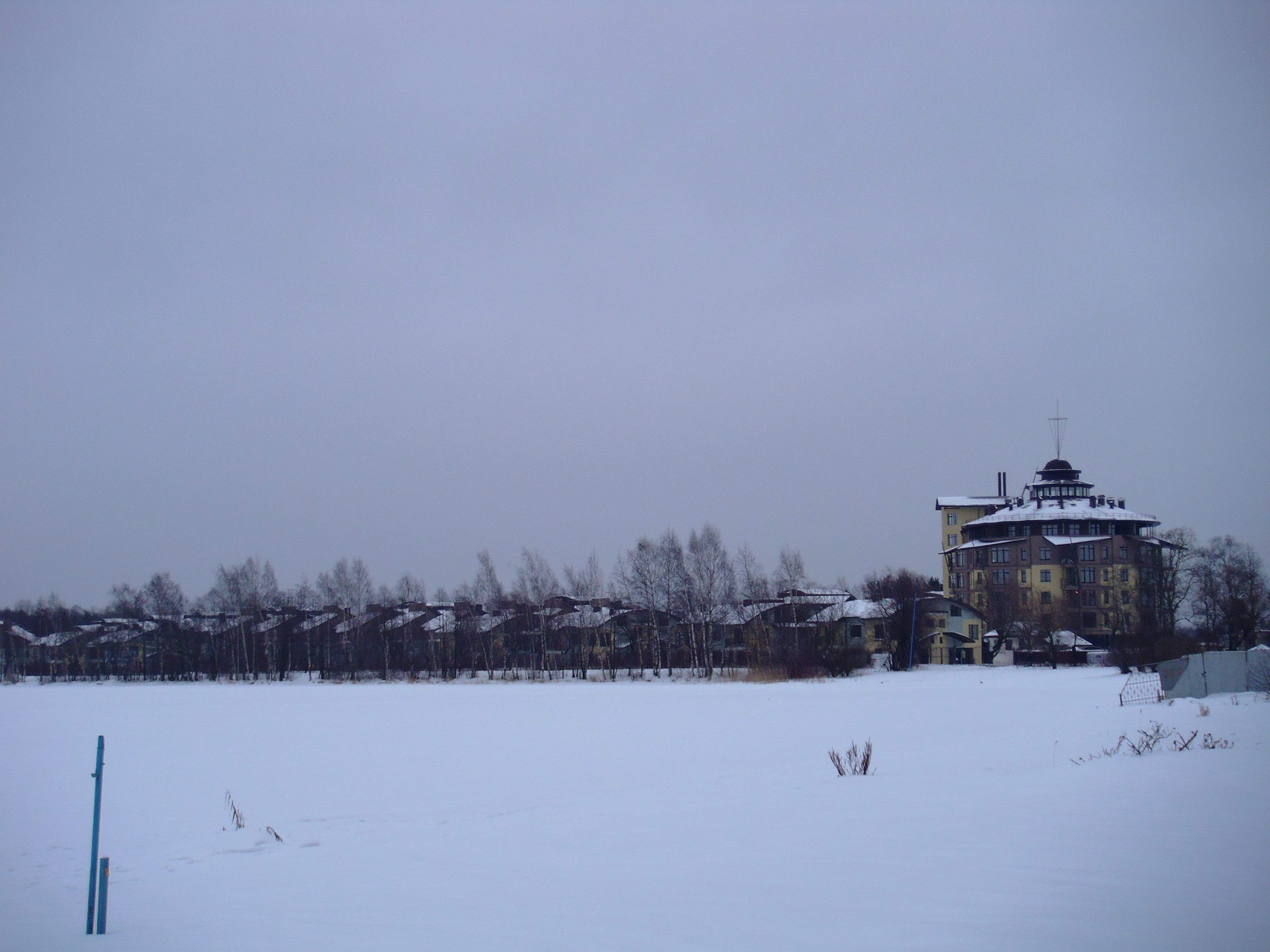 Сестрорецк СПб. Застройка берегов Сестрорецкого Разлива